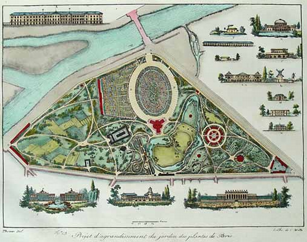 Project d'agrandissement du jardin des plantes de Paris. Gabriel Thouin, in Plans raisonnés de toutes les espèces de jardins, tiré ici d'une réédition de 1838 (la première édition datant de 1820).